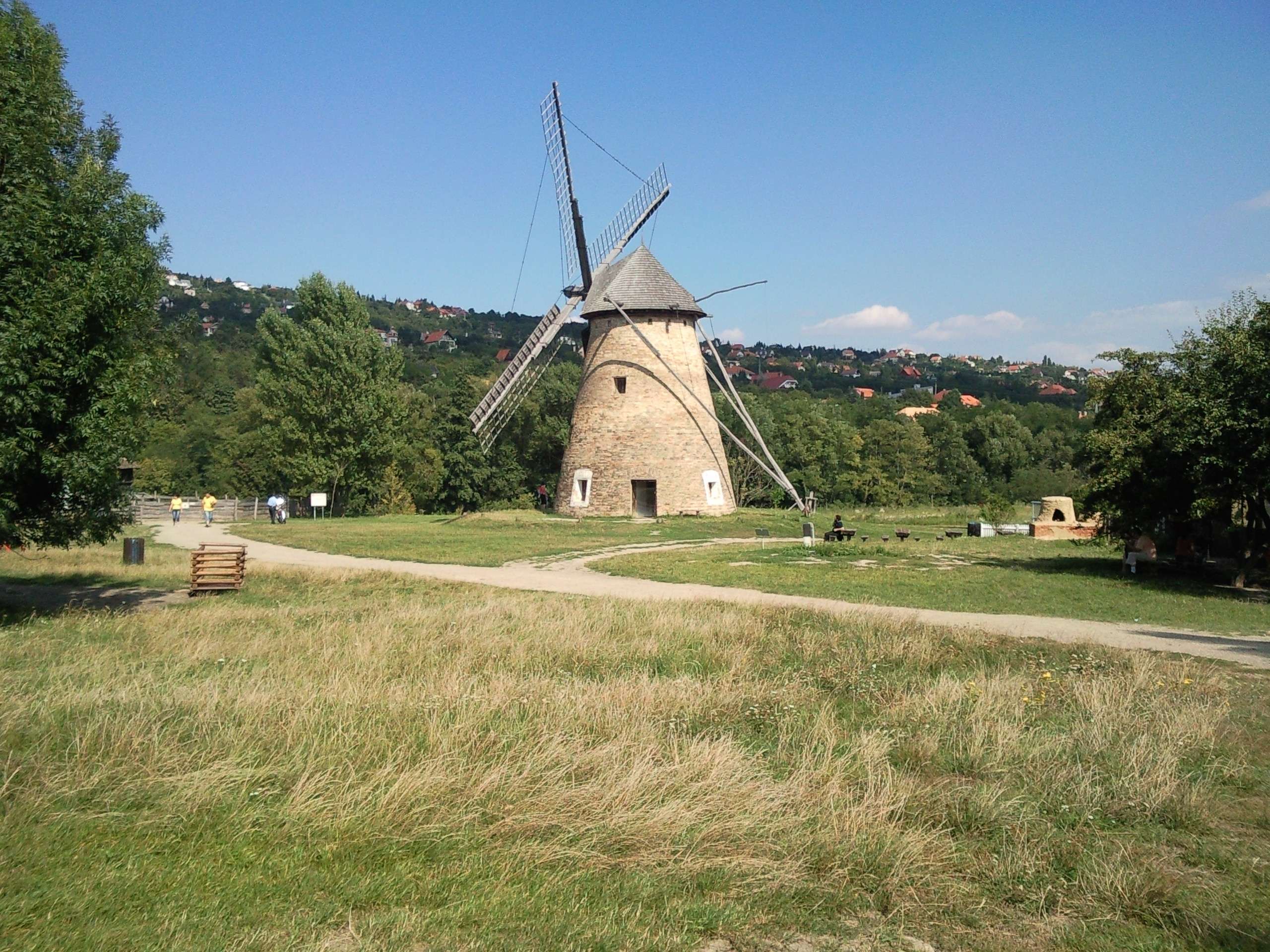 Szentendre, Hungary